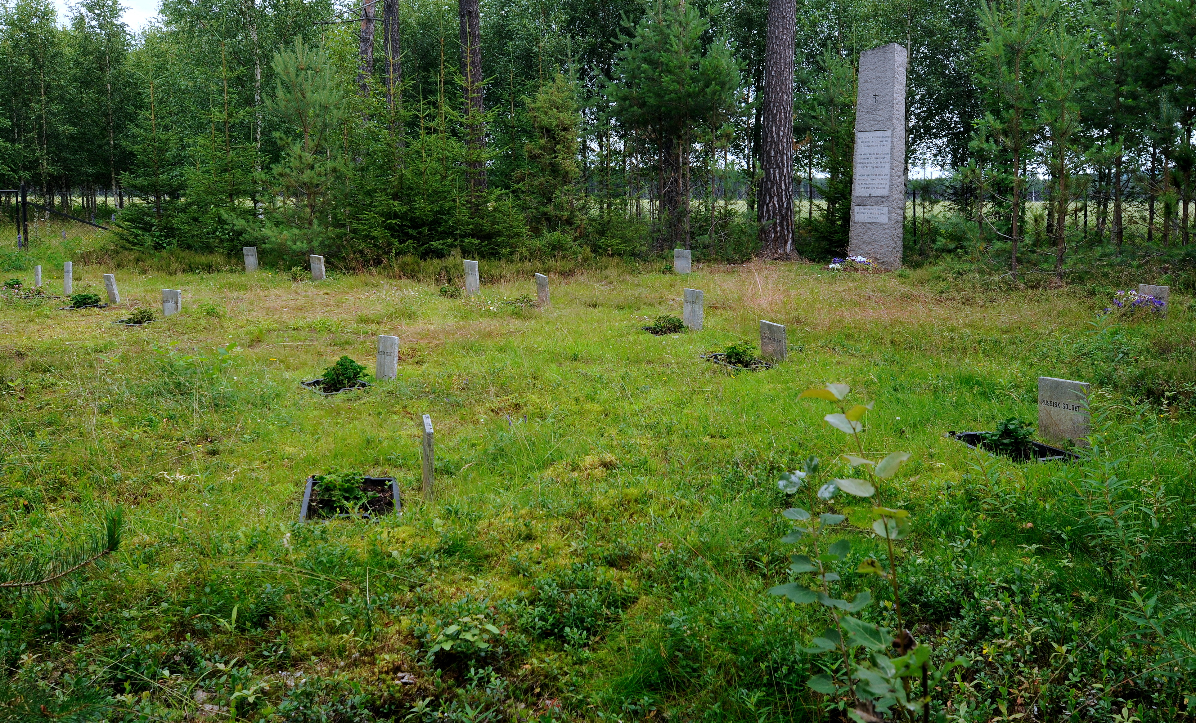 Krigsminnesmerke ved Haslemoen i Våler